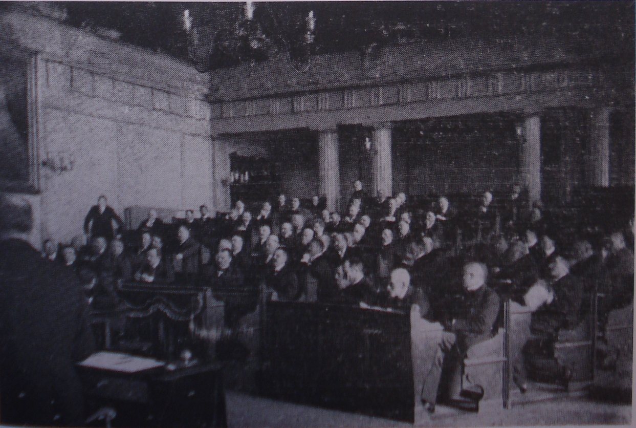 Sabor 1914.